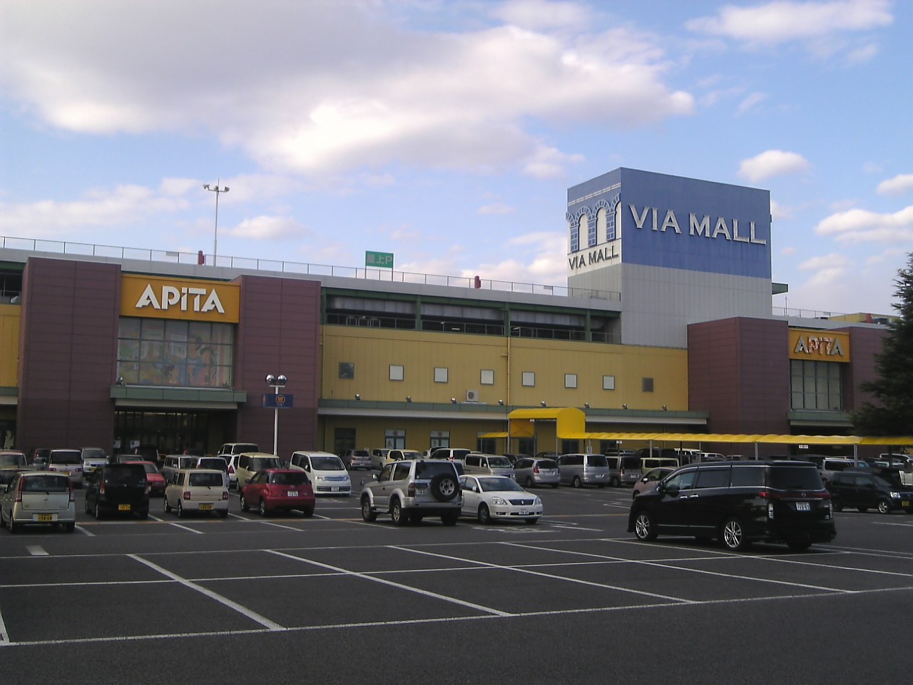 ビアモール店舗外観